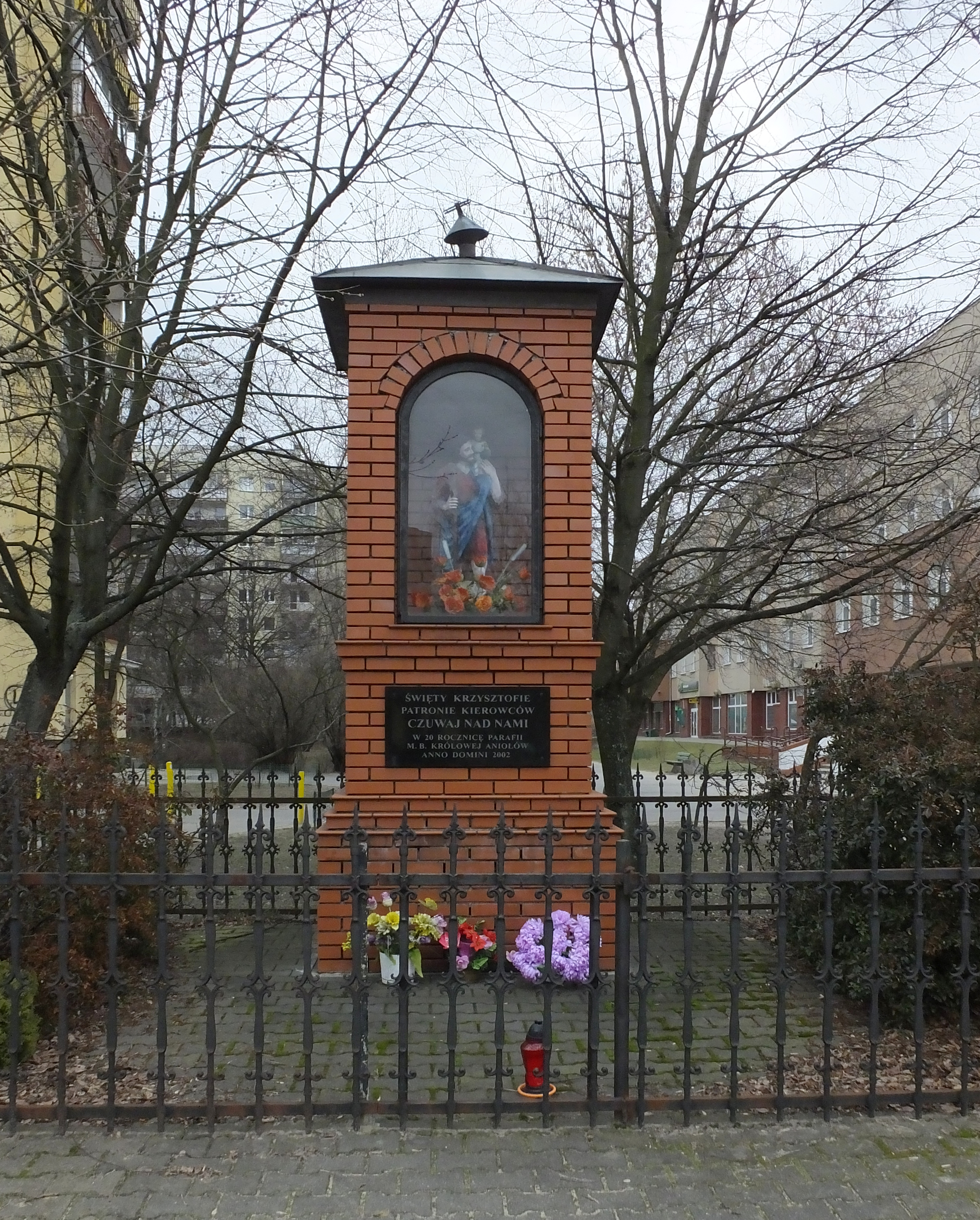 Kapliczka na rogu ul. Wrocławskiej i Androllego w Warszawie. Tekst "Święty Krzysztofie, patronie kierowców, czuwaj nad nami. W 20 rocznicę parafii M. B. Królowej Aniołów, anno domini 2002"